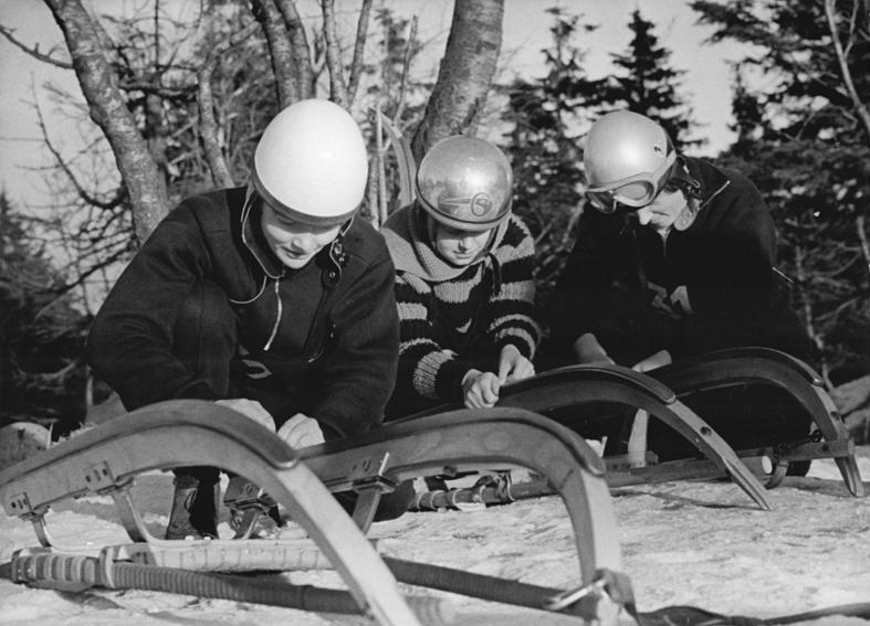 Werth, Ortrun Enderlein, Lein Zentralbild Gahlbeck Tr 7.1.1962 DDR-Elite am Start-Am 6. und 7.1.1962 eröffneten die Rennschlittensportler aus allen Bezirken der DDR mit dem Fichtelbergrennen die Saison. Die schneesichere Bahn am Fichtelberg ist 1 600 m lang und der Start befindet sich auf der Spitze des Fichtelberges. Zum Auftakt der Saison waren über 100 Rennrodler am Start. UBz: Die Rennschlitten werden für den Start vorbereitet. Von links nach rechts: Die Rennschlittensportler der weiblichen Jugend Werth, Enderlein und Lein.